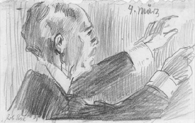 Ernst von Schuch dirigiert. Bleistiftzeichnung, vor 1914. 12,4 x 19,7 cm